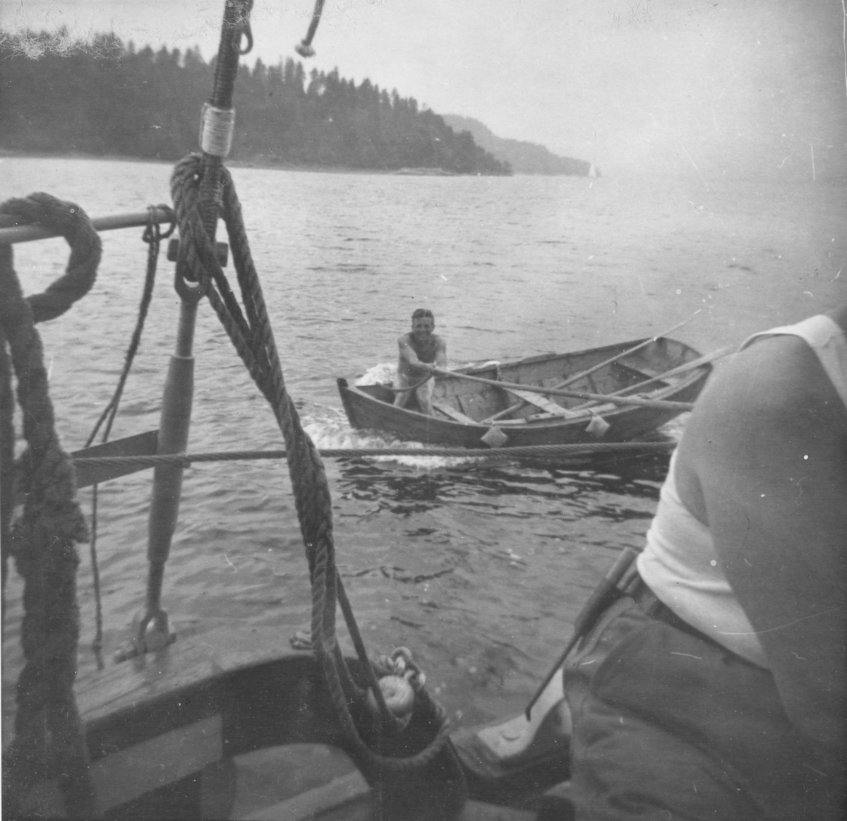 Jul. Nielsen ombord i "Stavangers" Lofotjolle.